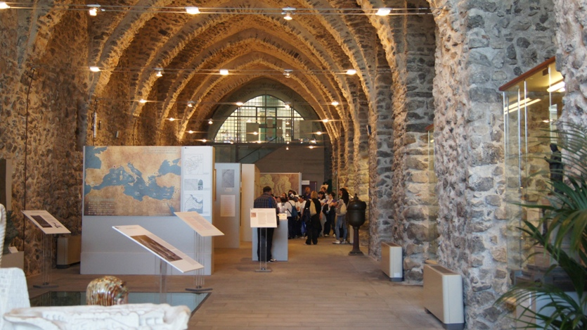 L'immagine raffigura l'interno dell'antico arsenale di Amalfi, ora sede dell'omonimo museo